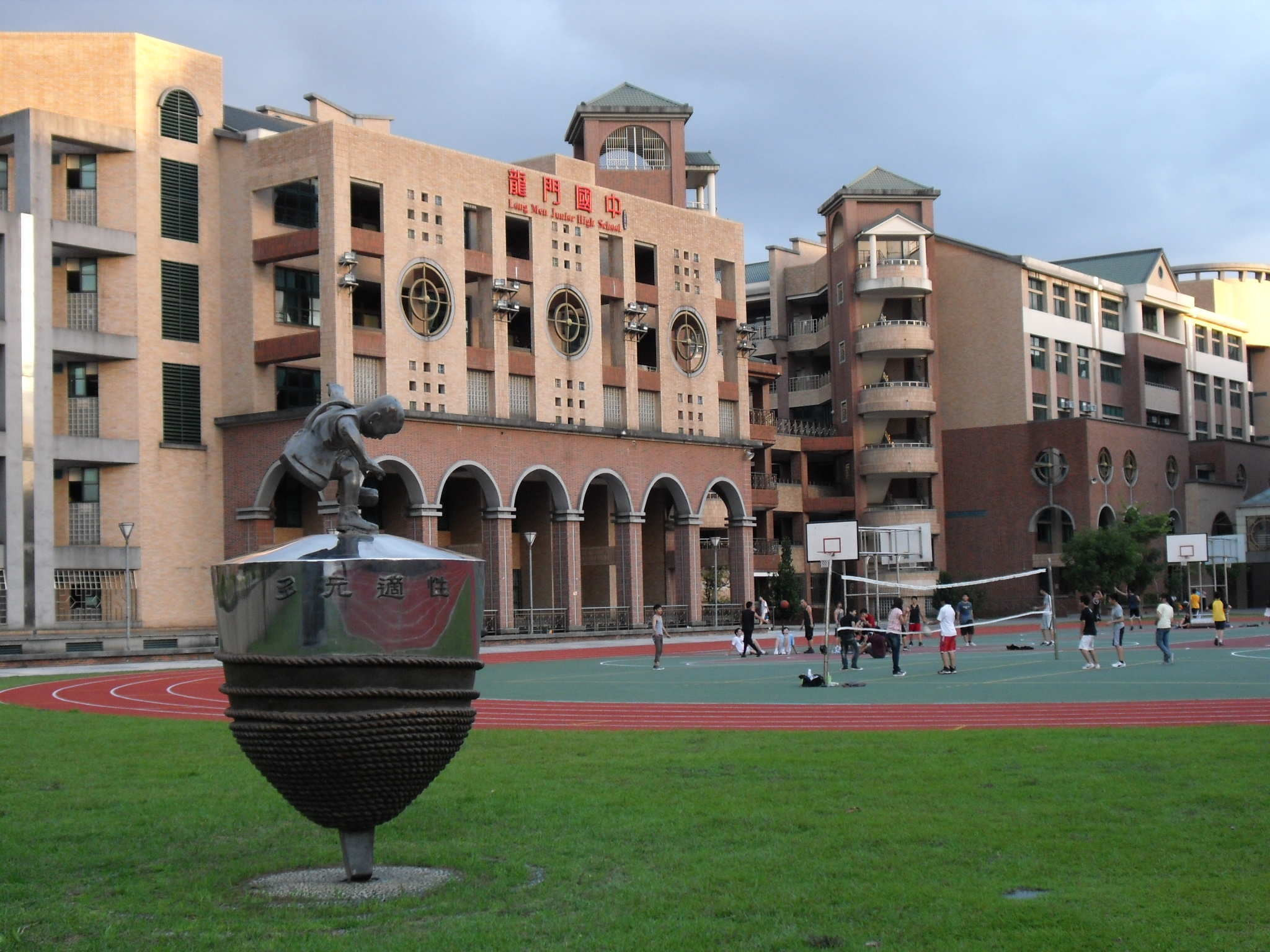 Bân-lâm-gú: 臺北市立龍門國民中學